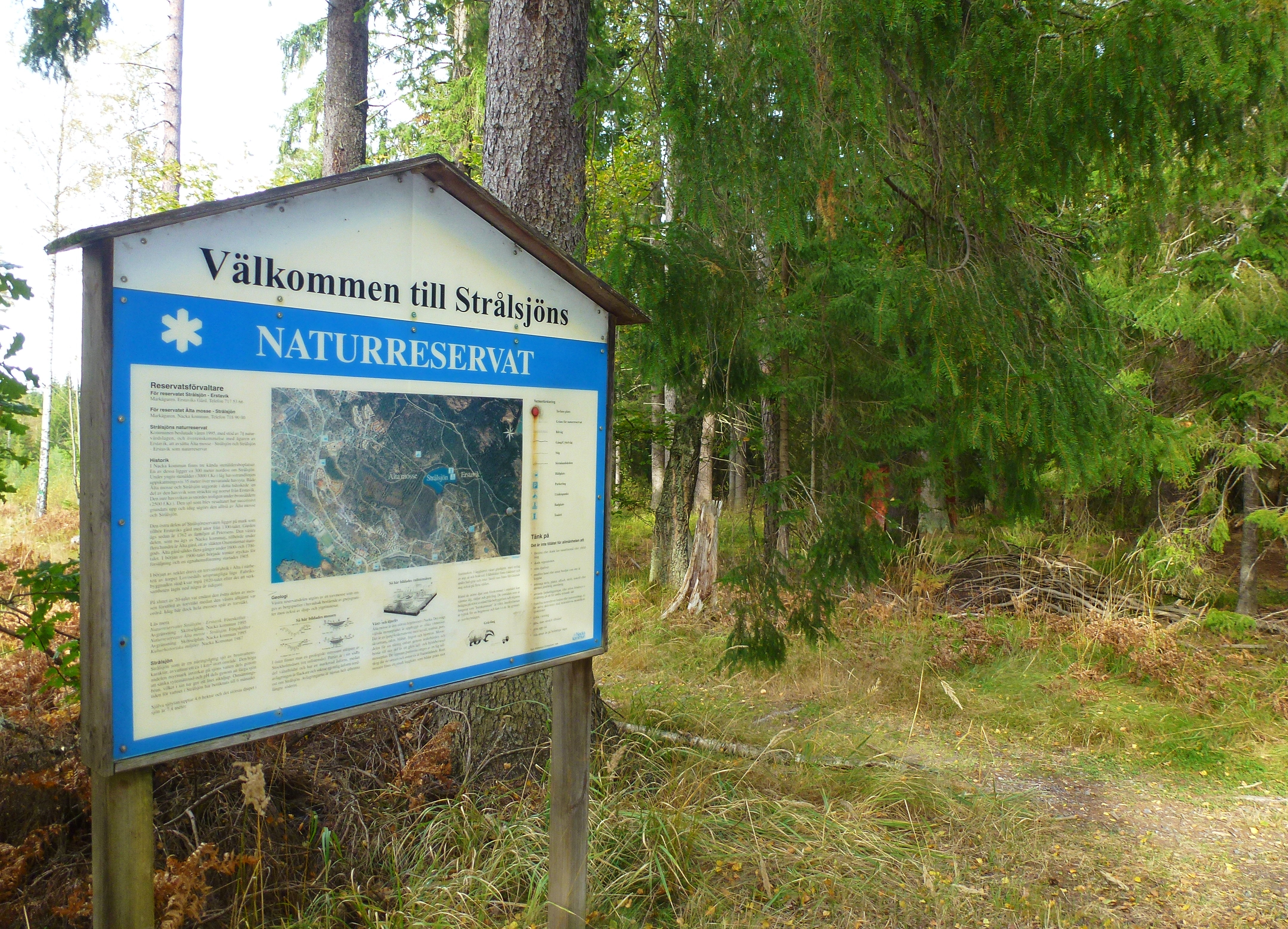 Strålsjöns naturreservat skylt